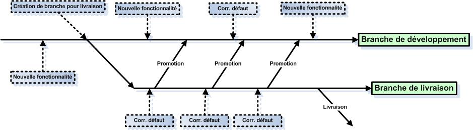 Modèle de branche par objectif utilisé en Gestion de configuration